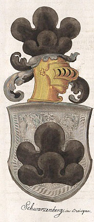 Wappen aus der Zimmerischen Chronik, Handschrift B, Württembergische Landesbibliothek Stuttgart, Cod. Don. 580a, S. 125, Allianzwappen Schwarzenberg (Breisgau) / Wappen Schwarzenberg isoliert